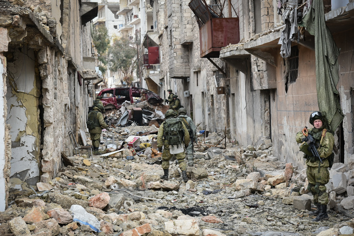 Работа сапёров Международного противоминного центра Министерства обороны России в Алеппо (Сирия)